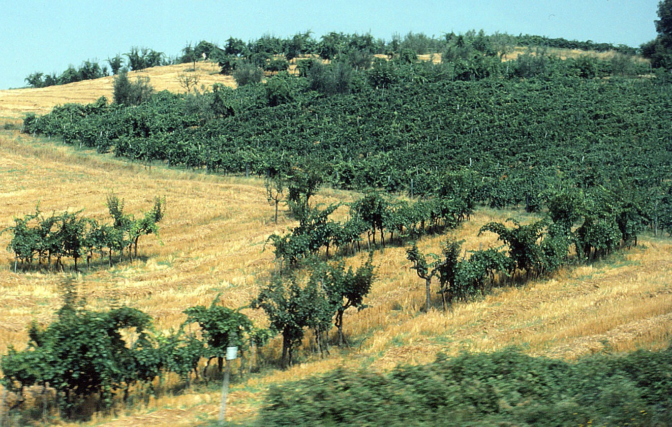 Erziehung von Rebstöcken zwischen Bäumen in der Toskana - Alberaqte